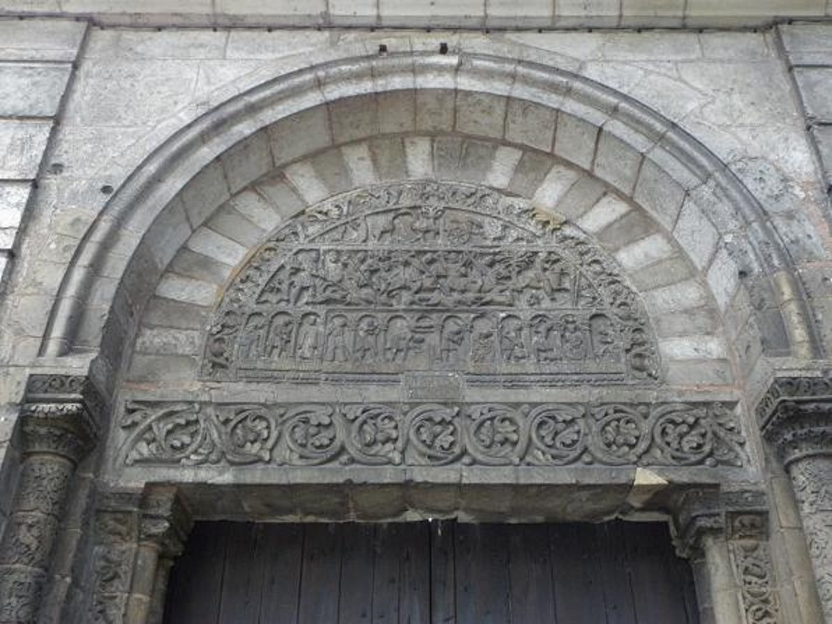 Portail Saint-Ours de la collégiale Saint-Ursin de Bourges (18). .